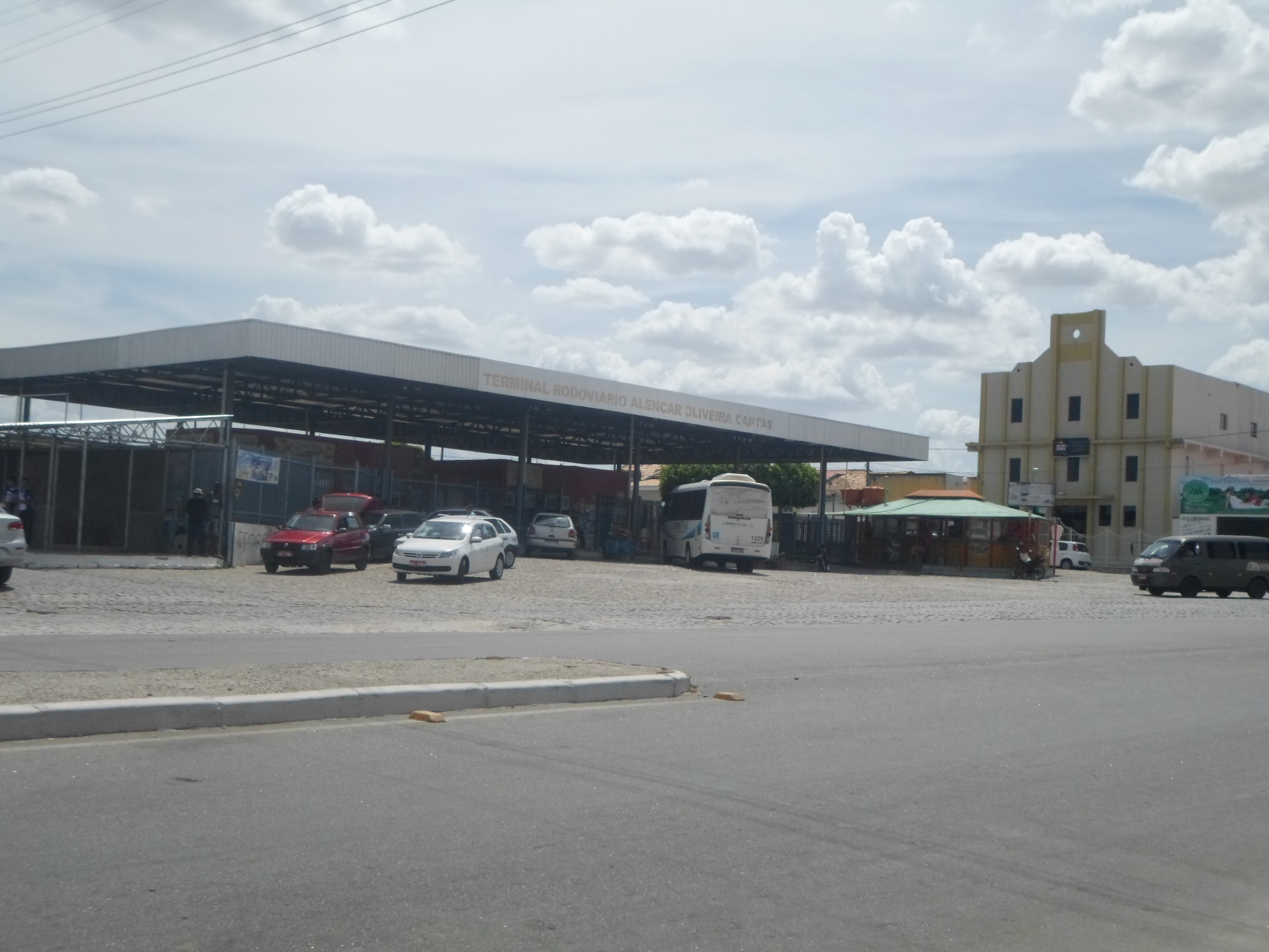 Vista do terminal rodoviário de Monte Alegre, às margens da rodovia SE 230 ou Avenida Manoel Elígio da Mota. Do lado direito a igreja Assembleia de Deus.